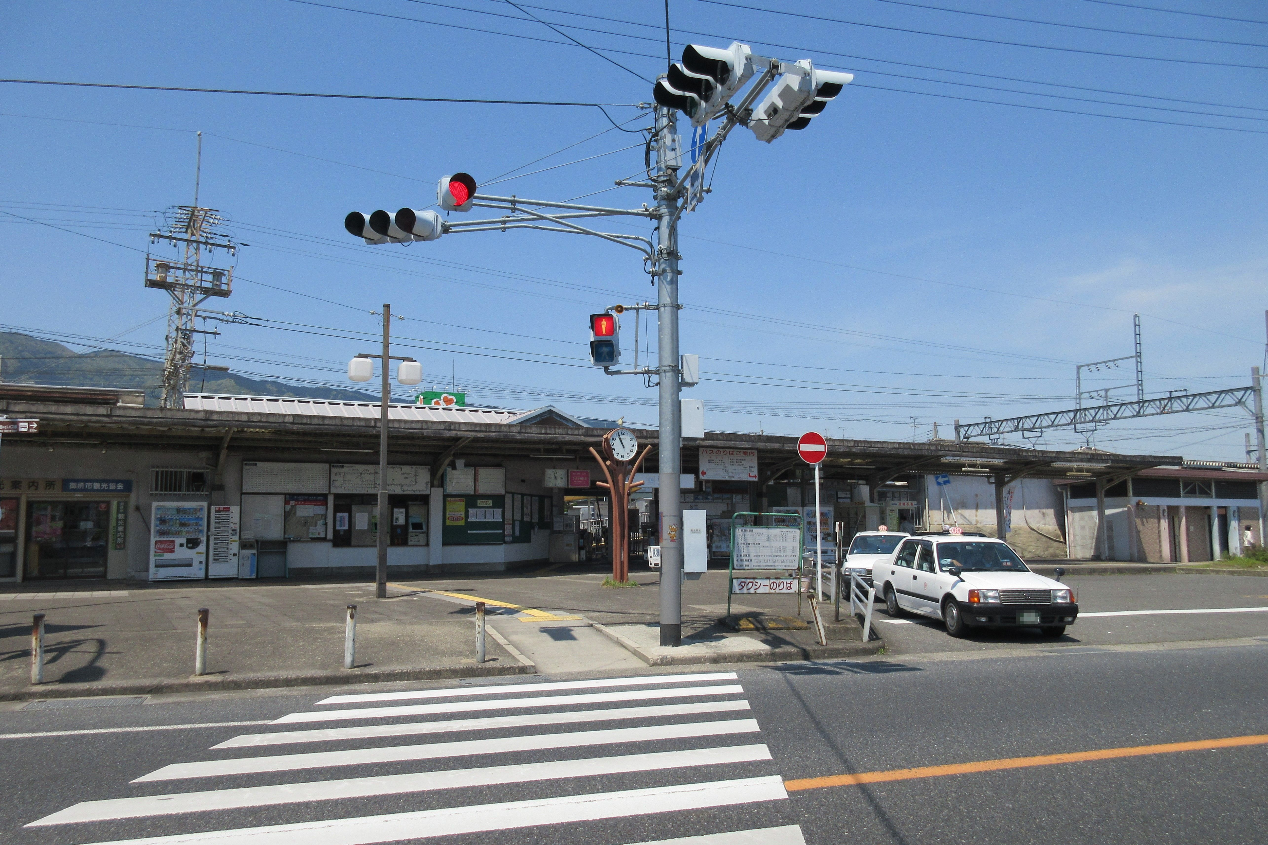 近鉄御所駅